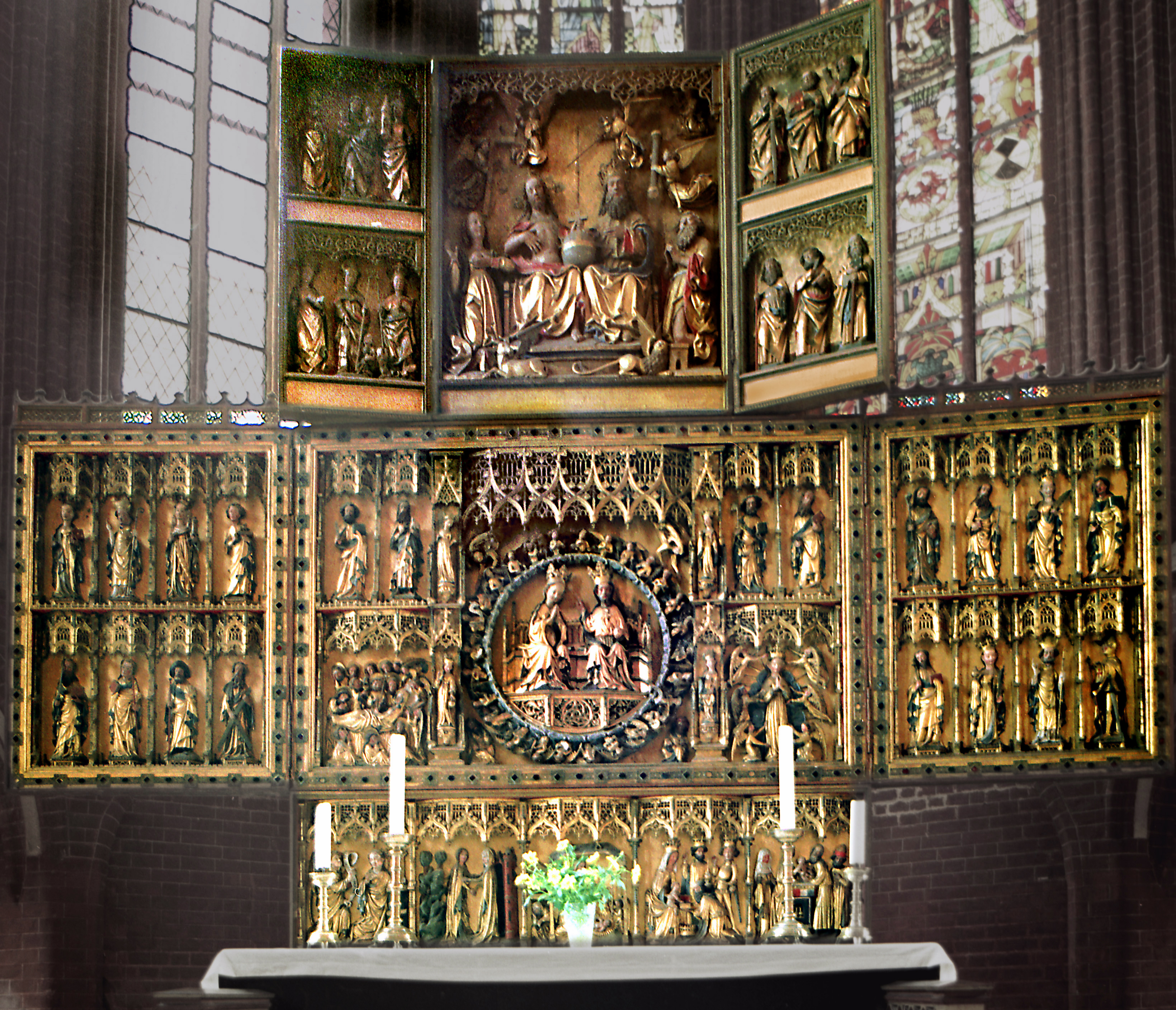 19.07.1986 3551 [39615] Werben (Elbe): Pfarrkirche St. Johannis (GMP: 52.859728,11.981958). Entstanden als 3-schiffige Halle ab dem 1. Viertel des 15. Jh. Altar aus zwei spätgotischen, übereinandergestellten Flügelaltären. Marien-Flügelaltar unten um 1430. Dreieinigkeitsaltar oben von 1500.[R19860719A08.TIF]19860719730NR.JPG(c)Blobelt